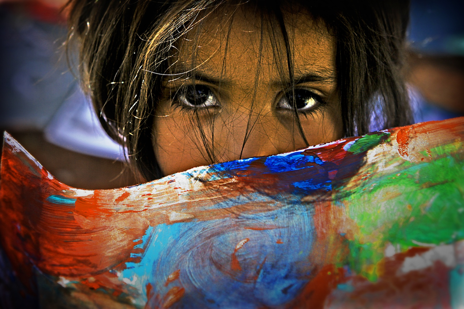 Fra Malerverkstedet